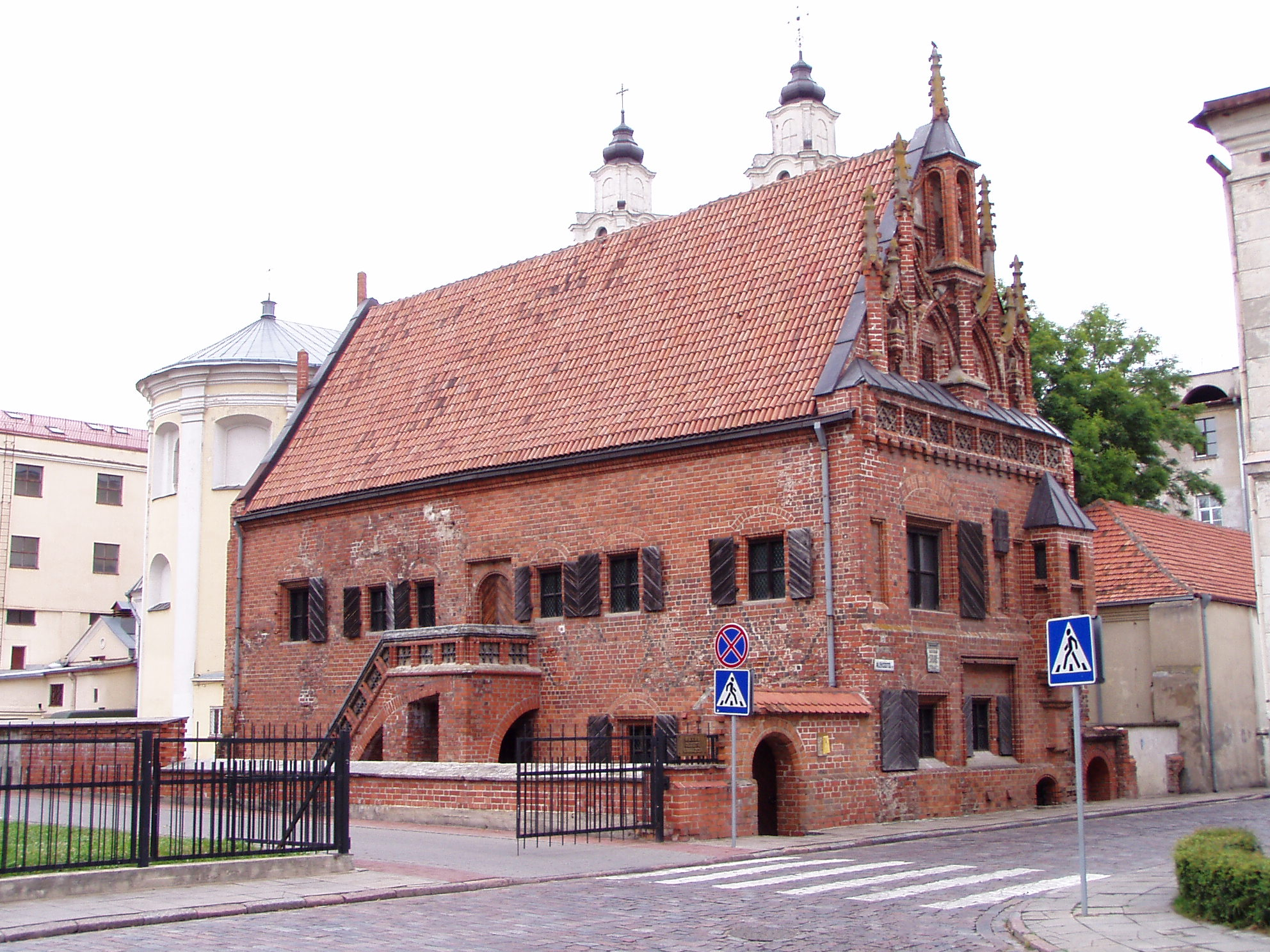 Kowno, Dom Perkuna